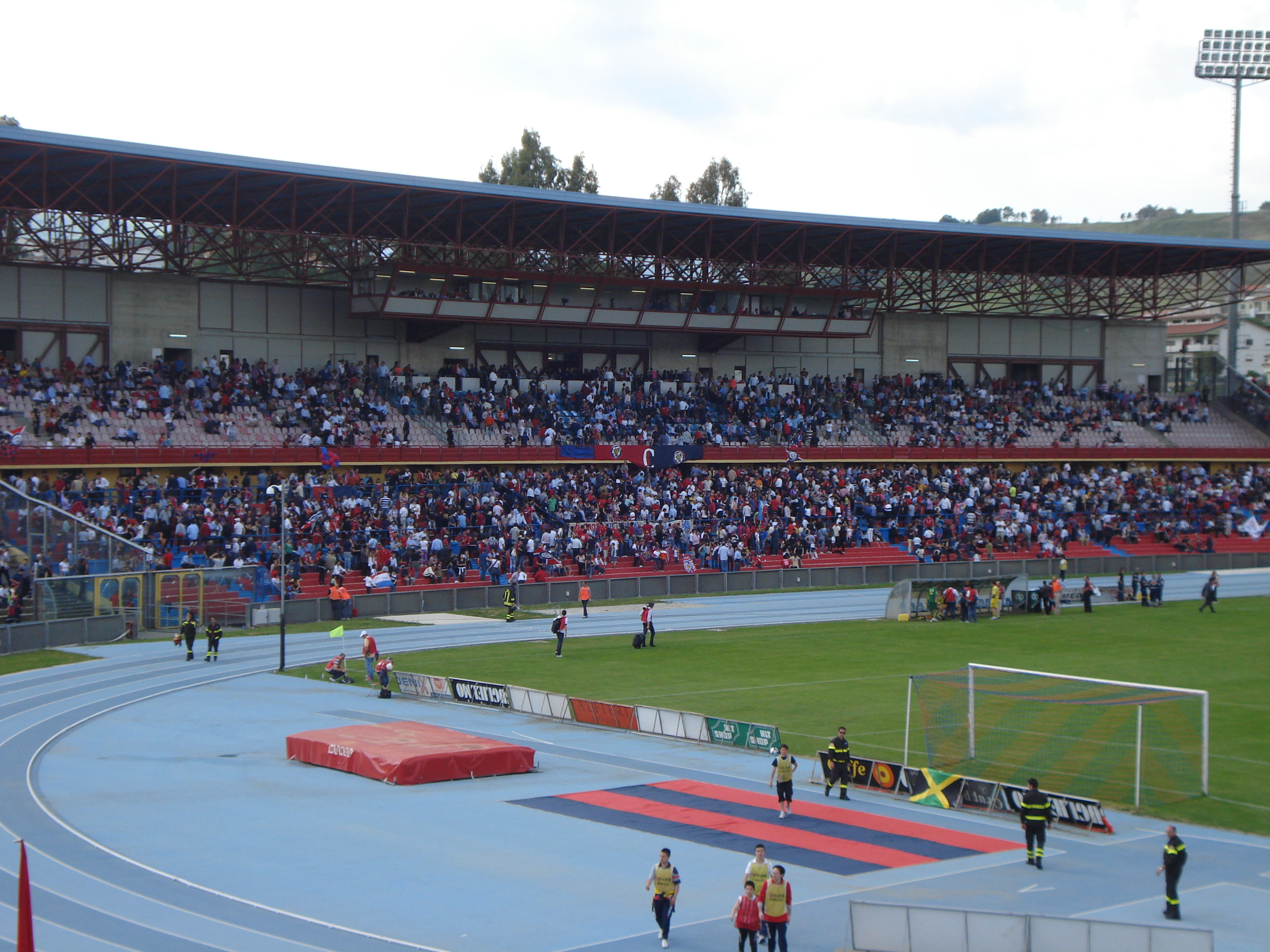 Tribuna A dello stadio San Vito di Cosenza in una partita del Cosenza Calcio 1914 nel campionato di Lega Pro Seconda divisione 2008-2009